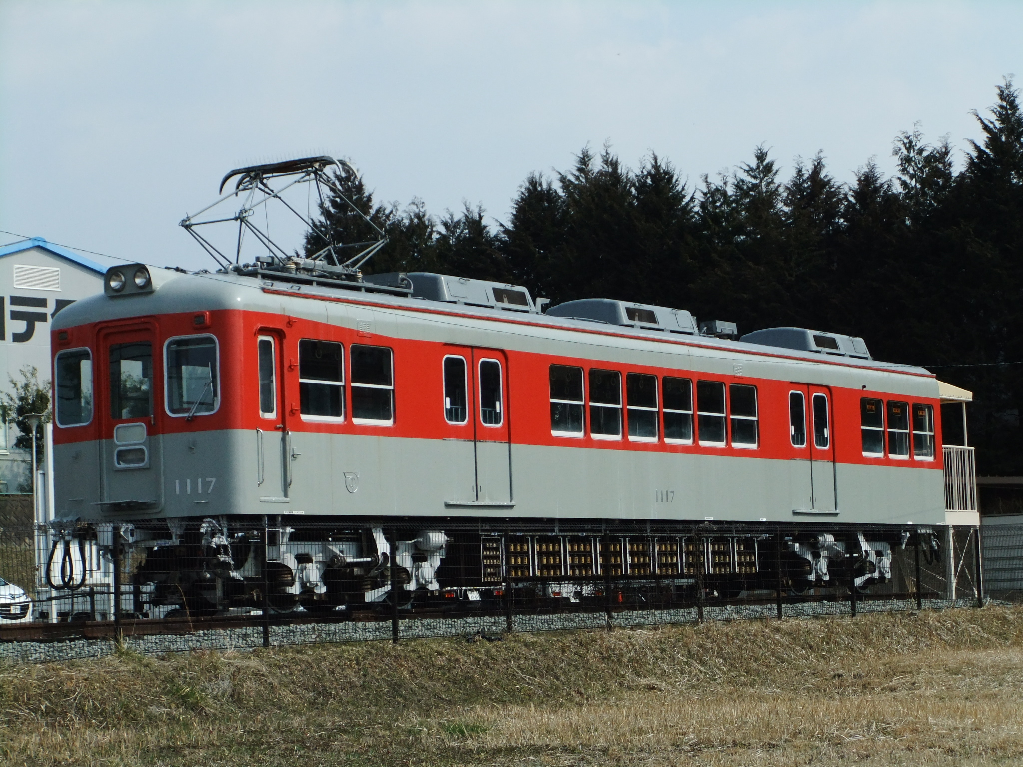 神戸電鉄1117 カコテクノス小野工場保存車 (公道より撮影)